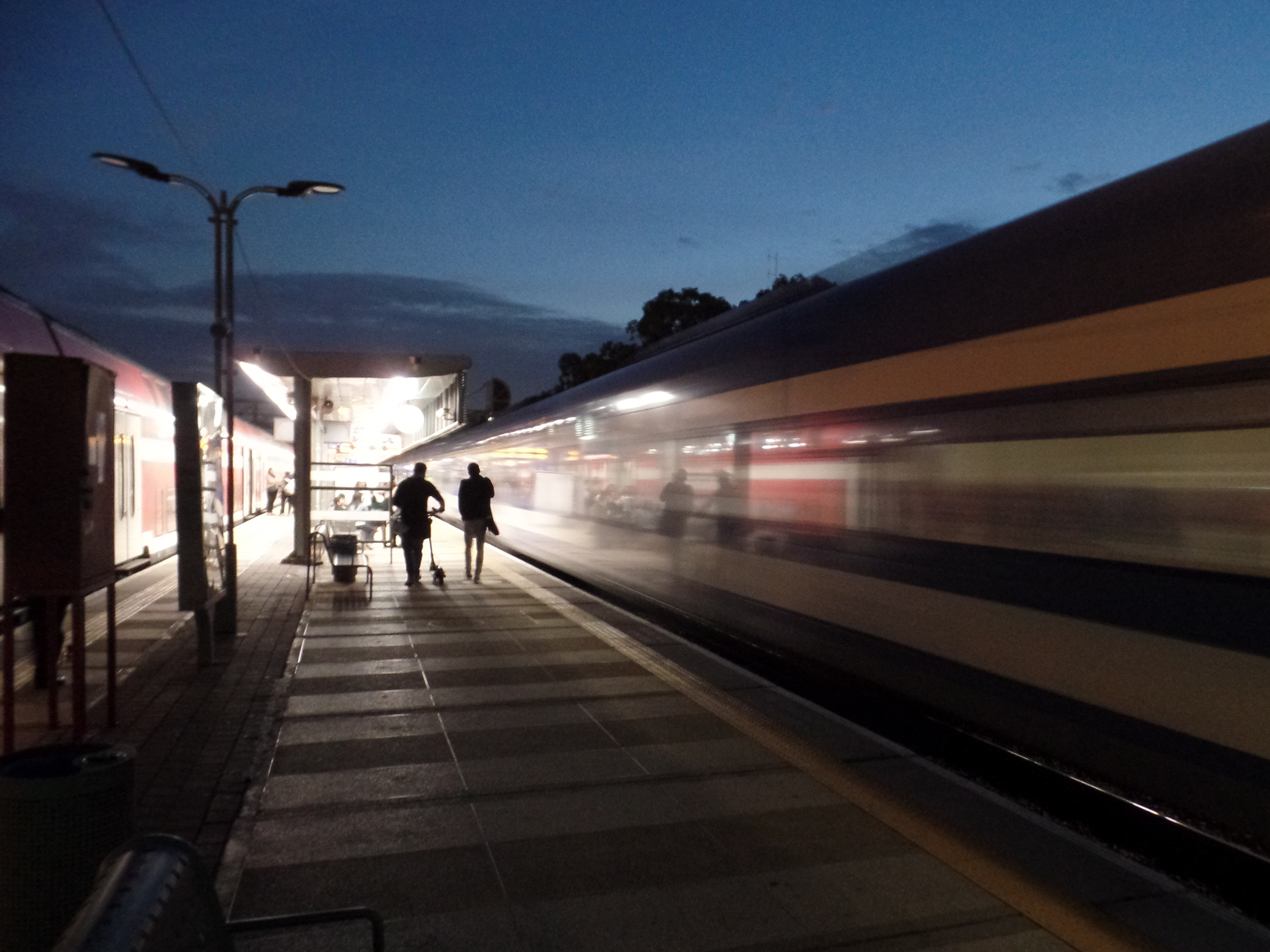 תחנת הרכבת בנתניה בשעות הערב